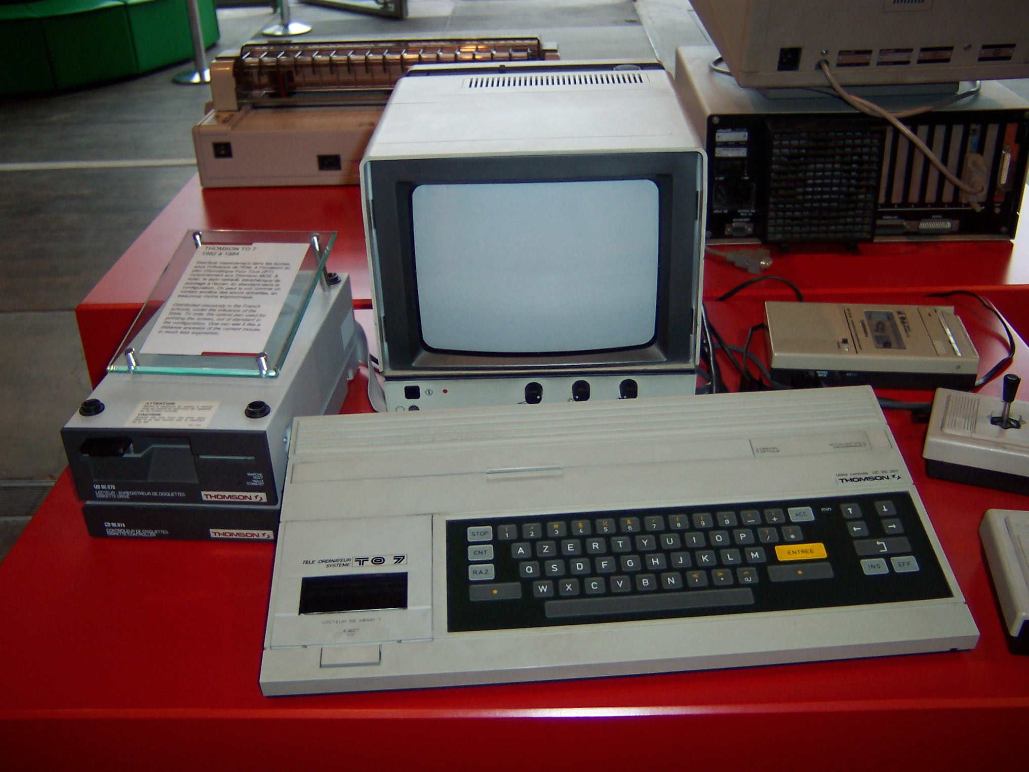 Fotos von historischen Computern in der Grande Arche